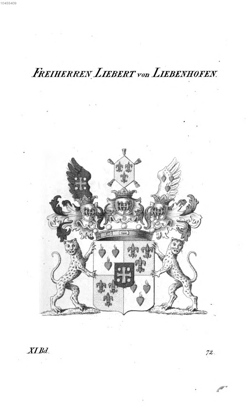 Wappen Liebert von Liebenhofen - Tyroff AT.jpg